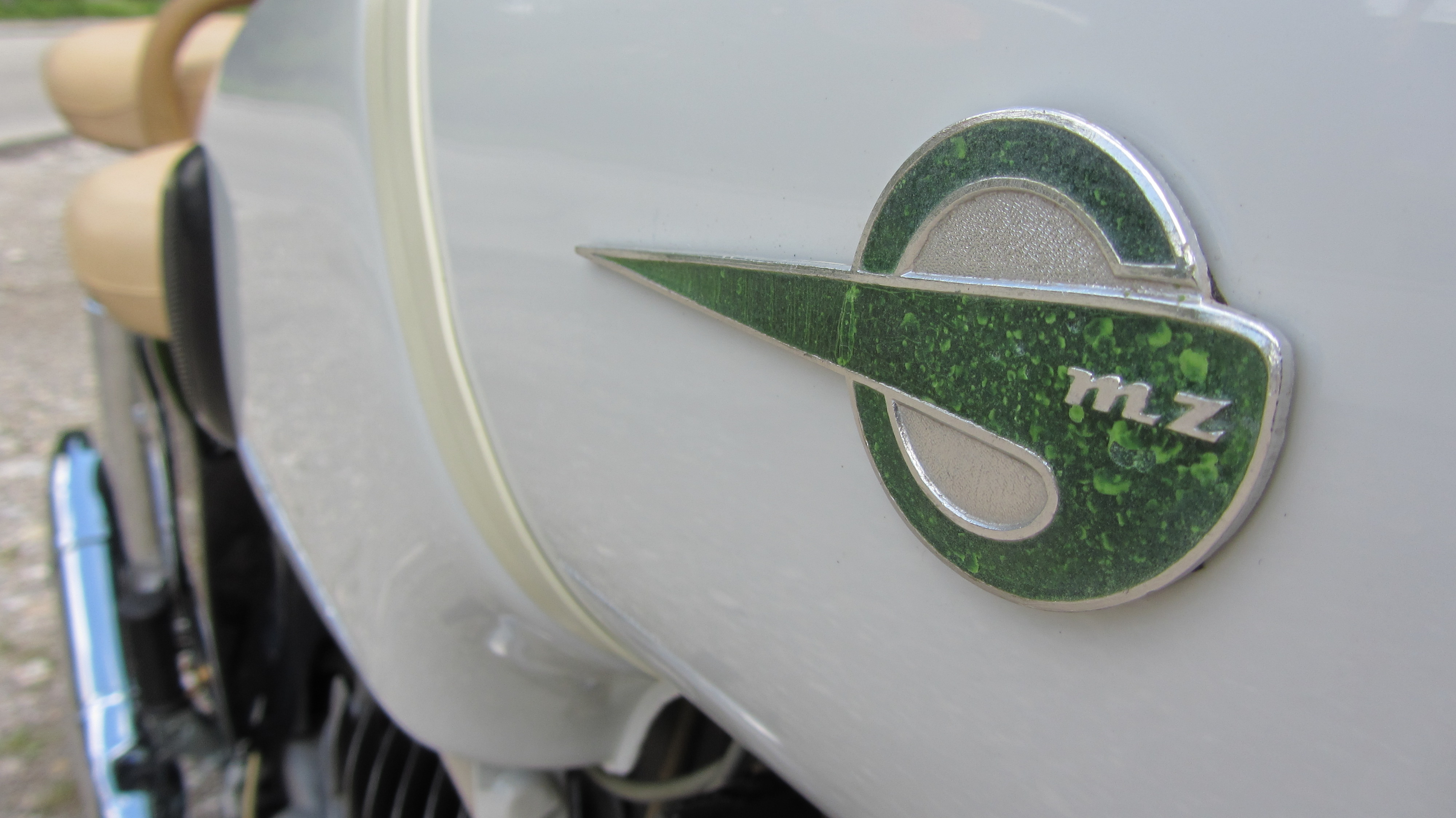 Logo der Marke MZ an einer ES 150 aus 1967